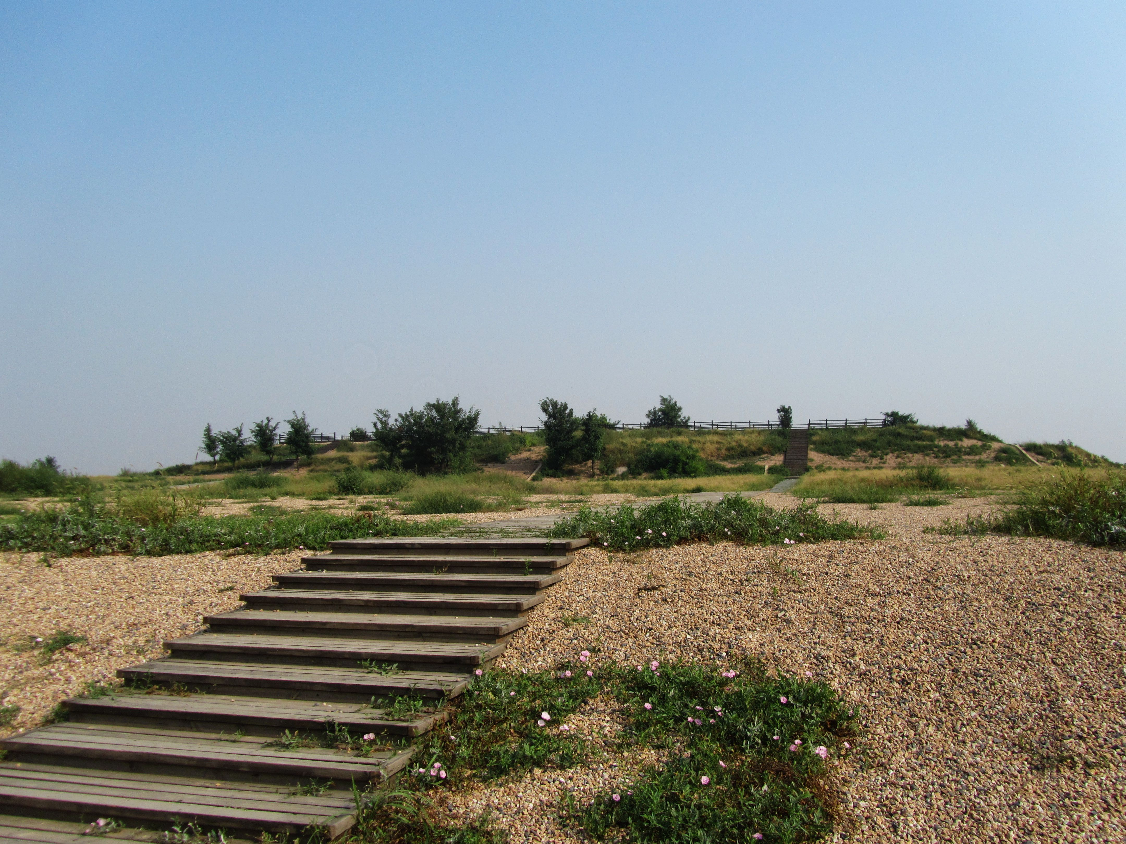 汉长安城遗址之1号建筑-未央宫前殿遗址。